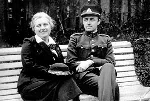 Sofija Čiurlionienė ir Vladys Zubovas 1938 metų vasarą savo namų kieme